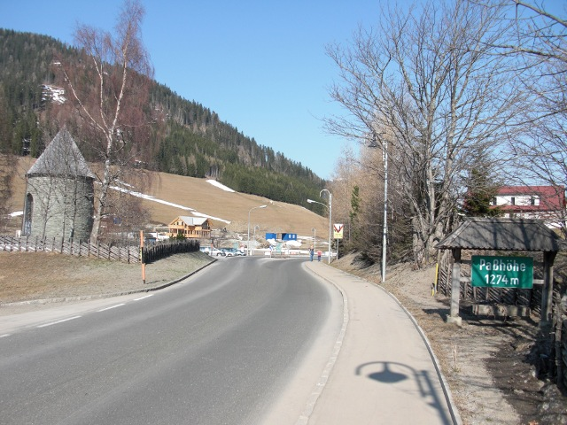 Passhöhe der Triebener Tauern in der Ortschaft Hohentauern